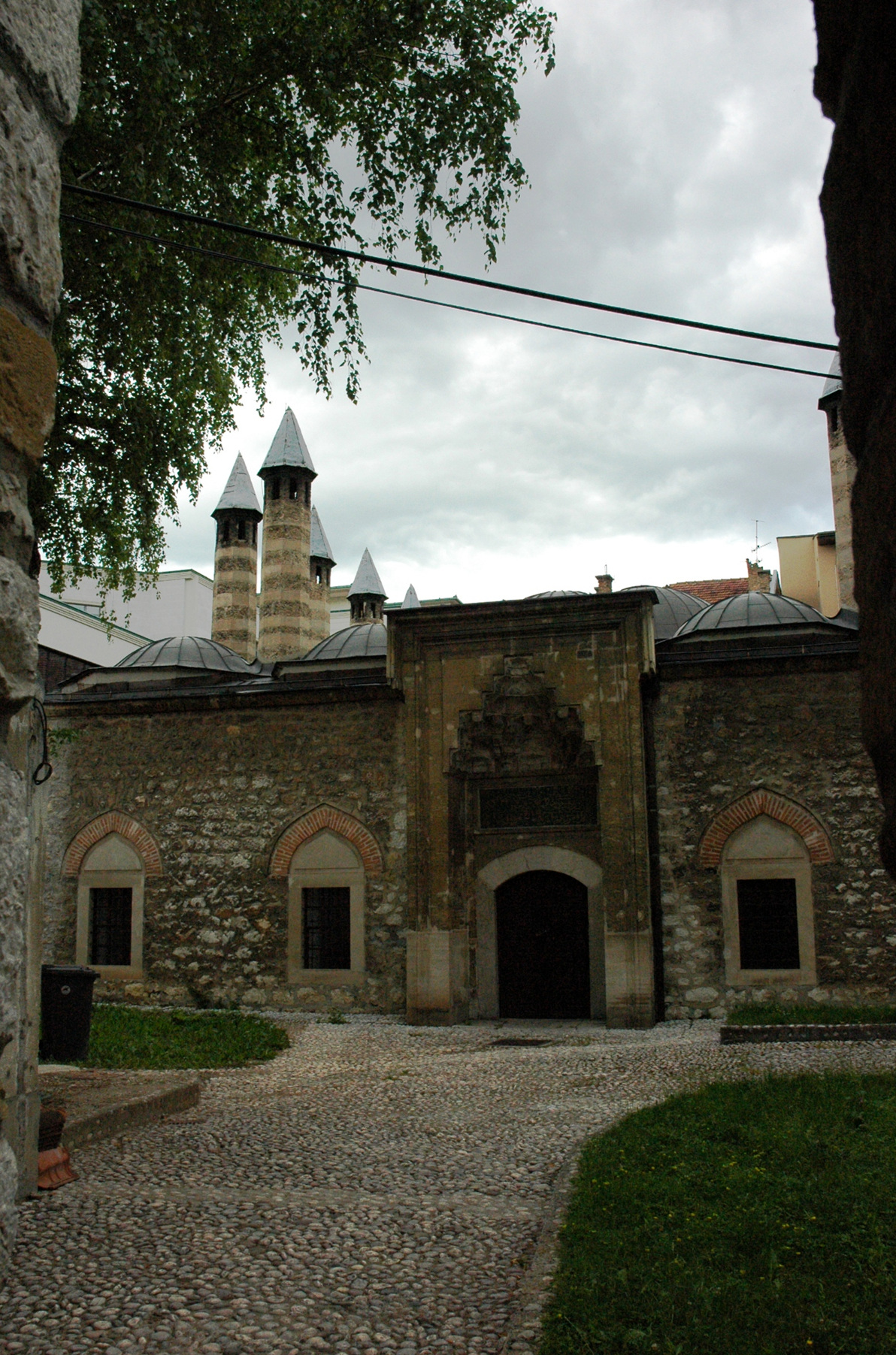 Gazi Husrev-begova medresa